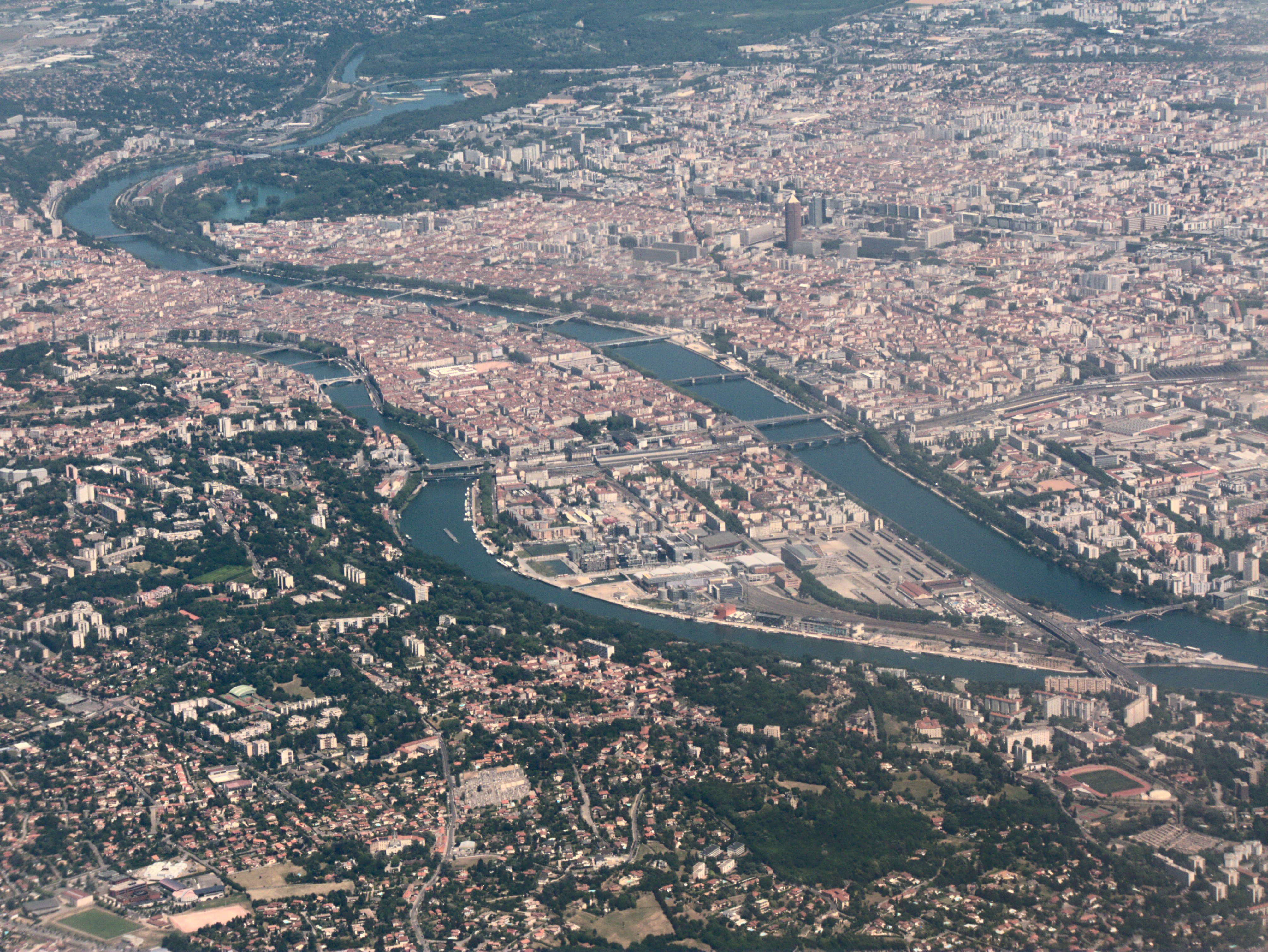 Lyon, la Presqu'île (entre Saône et Rhône)